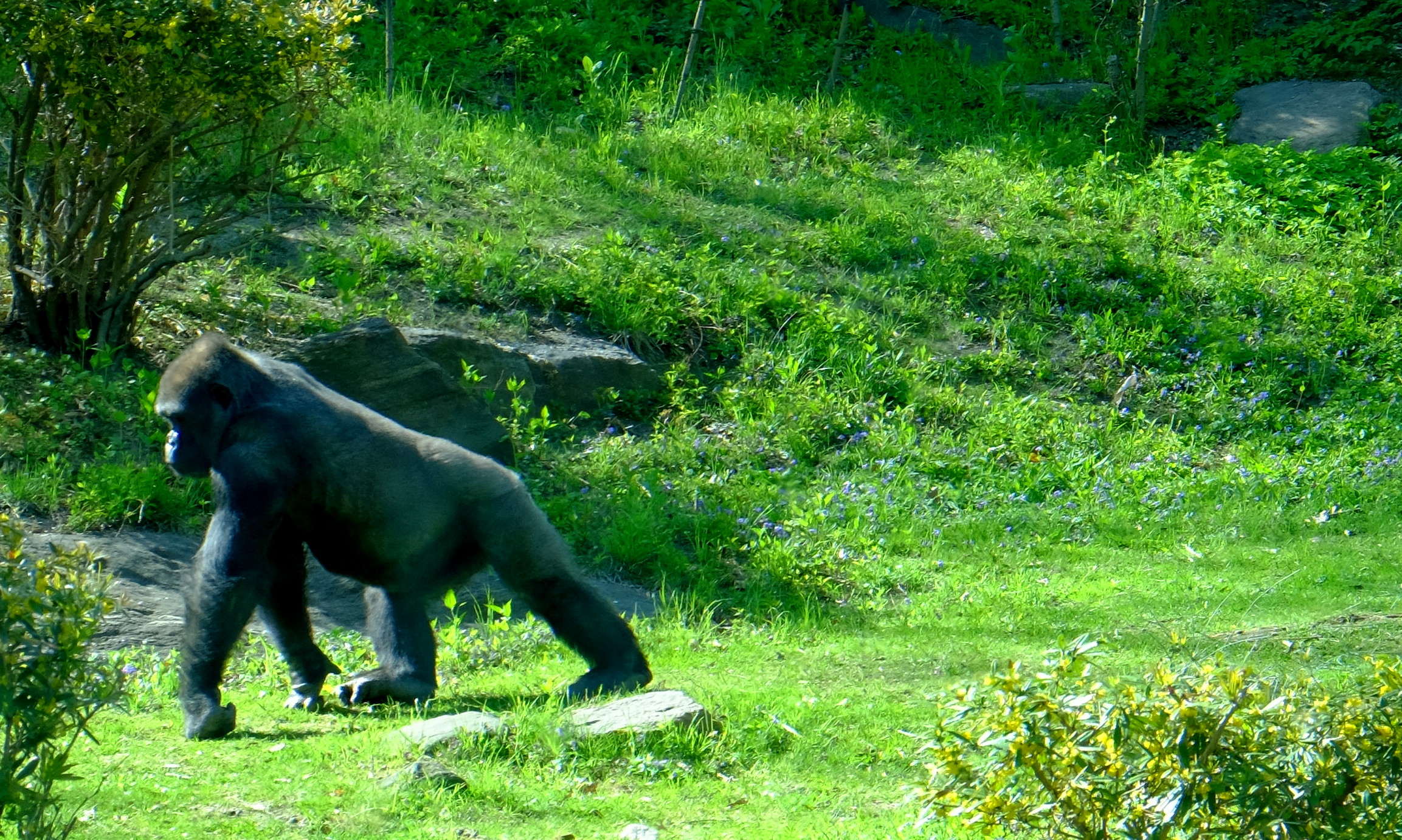 Gorrilla